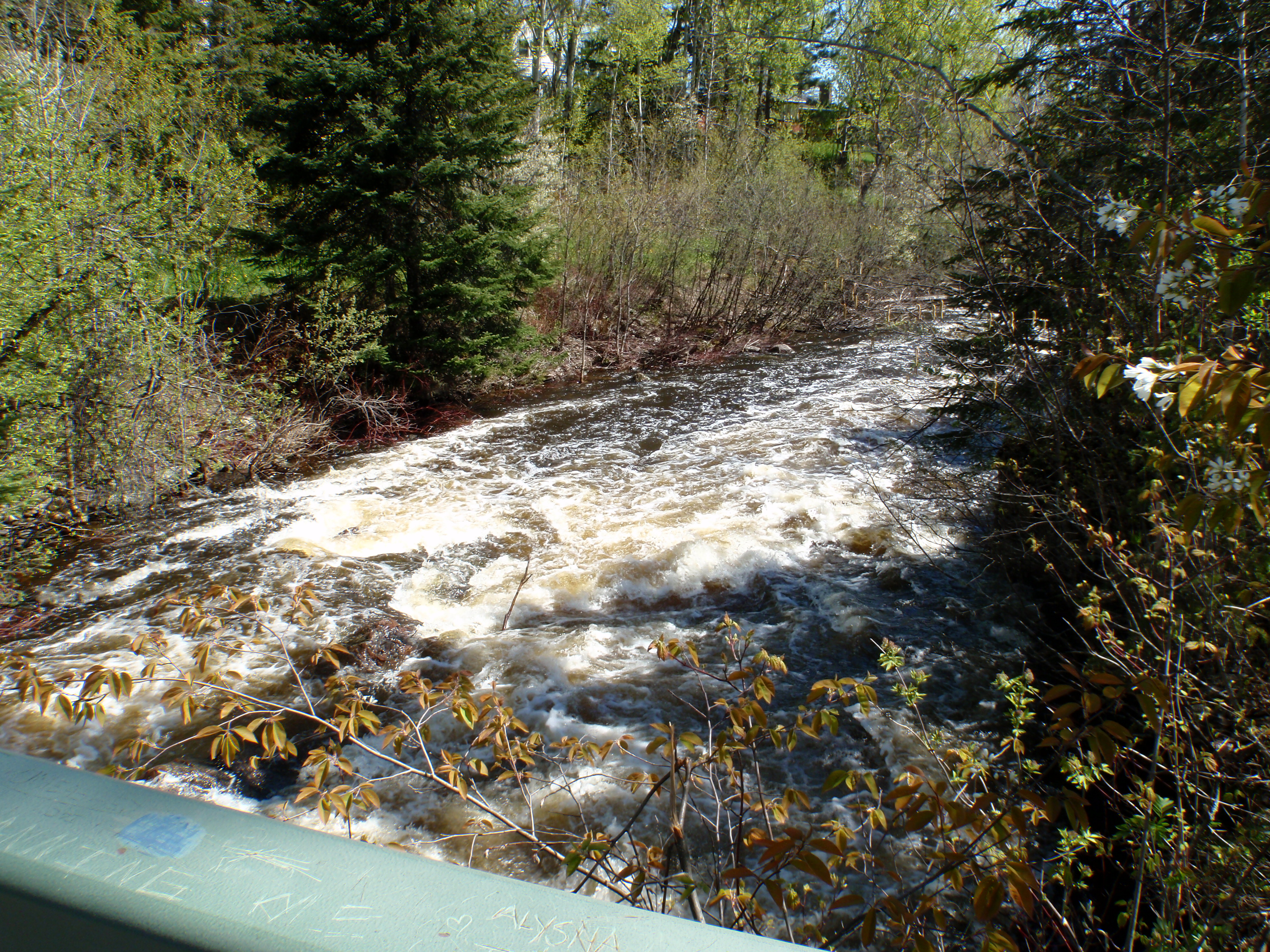 Walking trail bridge in Swastika